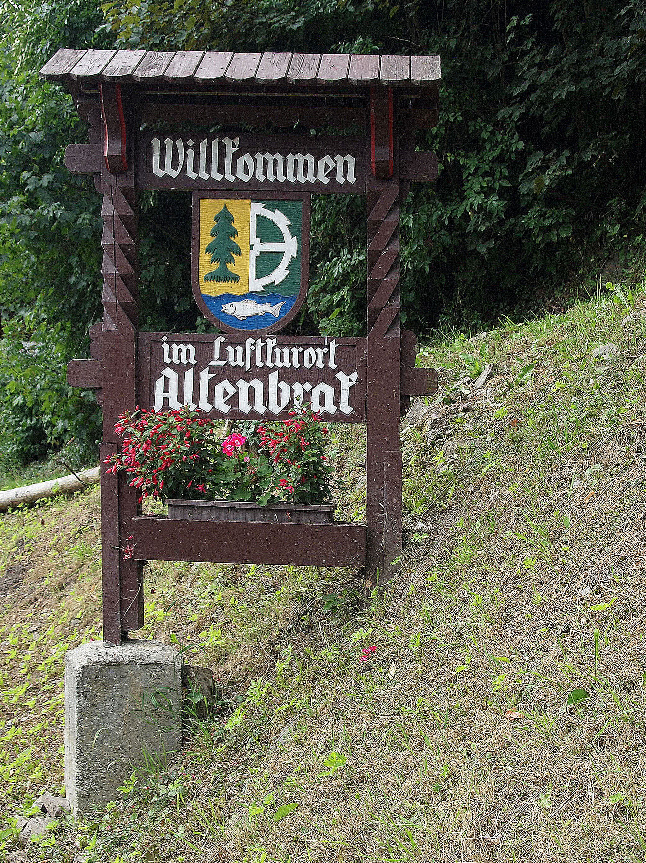 Begrüßung am Ortseingang (aus Richtung Treseburg) von Altenbrak (Landkreis Harz; Sachsen-Anhalt)